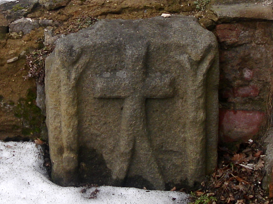 Krzyż choleryczny przy kościele pod wezwaniem św. Marcina w Bukowcu